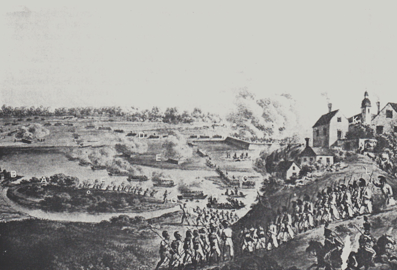 Gefecht bei Rheinweiler am 17. September 1793. Die französische Revolutionsarmee (siehe D; E; F) versuchte bei Rheinweiler mit Pontonbooten (F) auf das rechte Rheinufer bei Rheinweiler (K) überzusetzen und wird dabei von den österreichischen Truppen (G; H) daran gehindert.